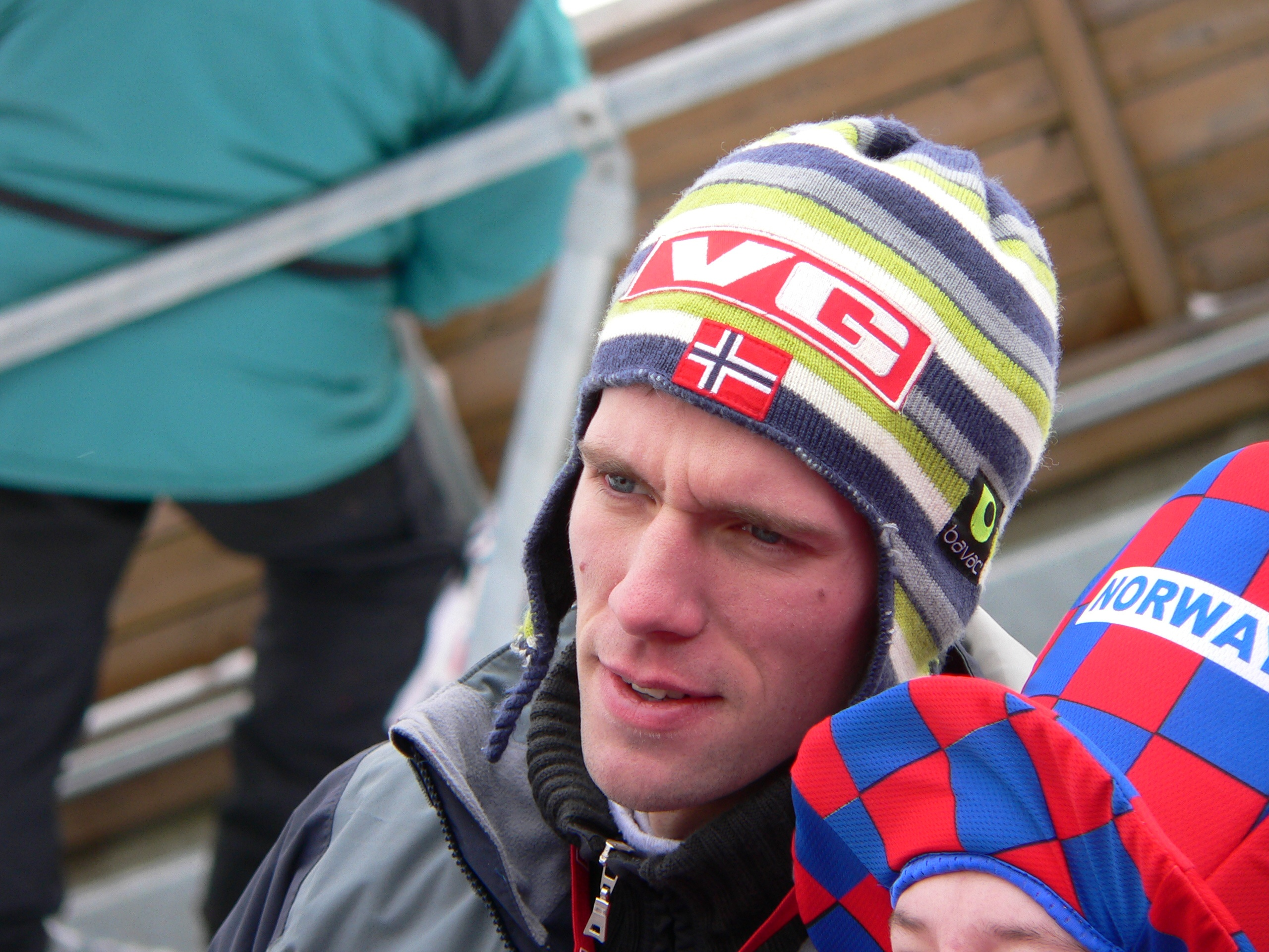 Norwegian ski jumper Sigurd Pettersen. Taken in Holmenkollen